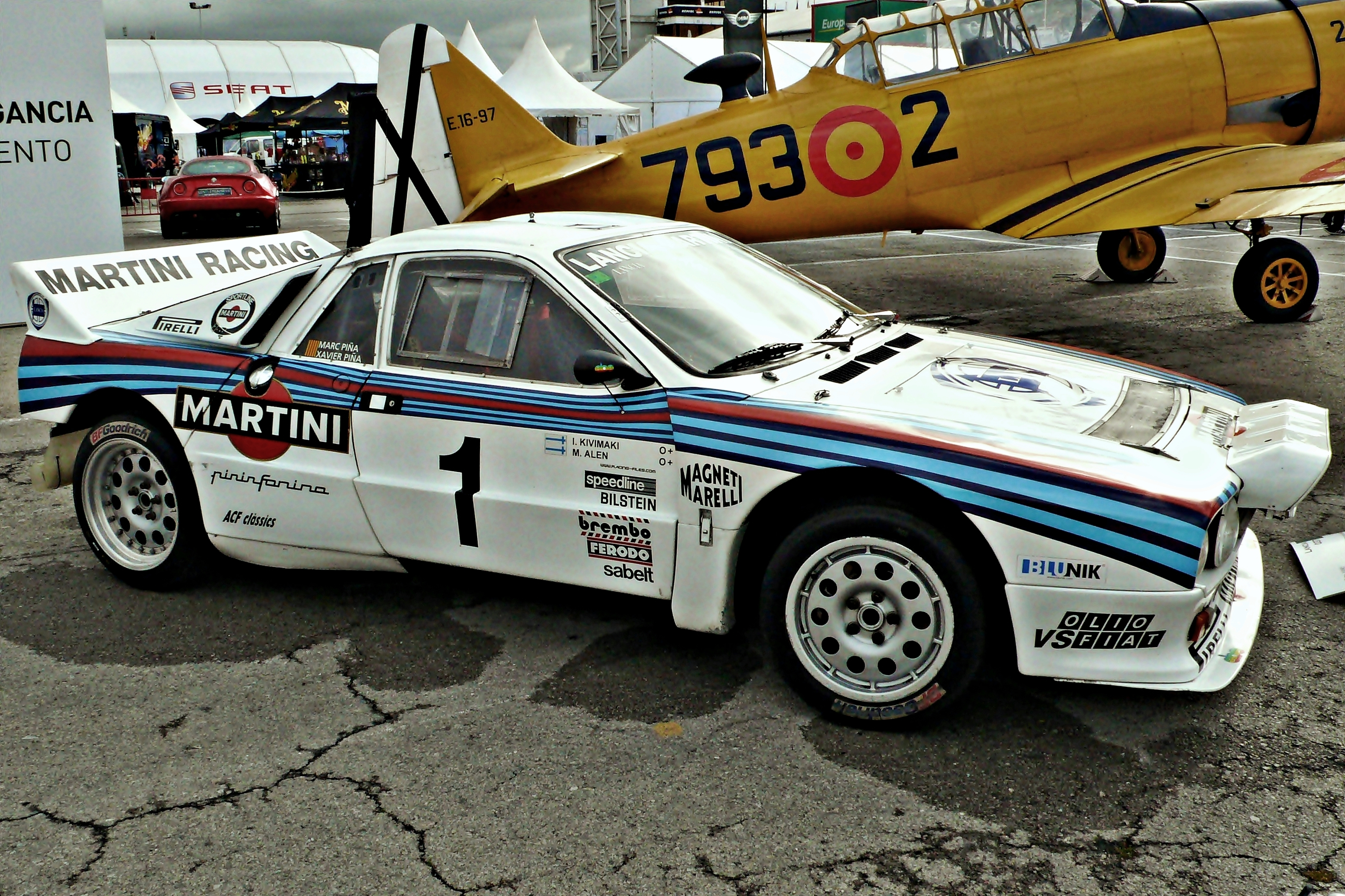 exposicion circuito montmelo